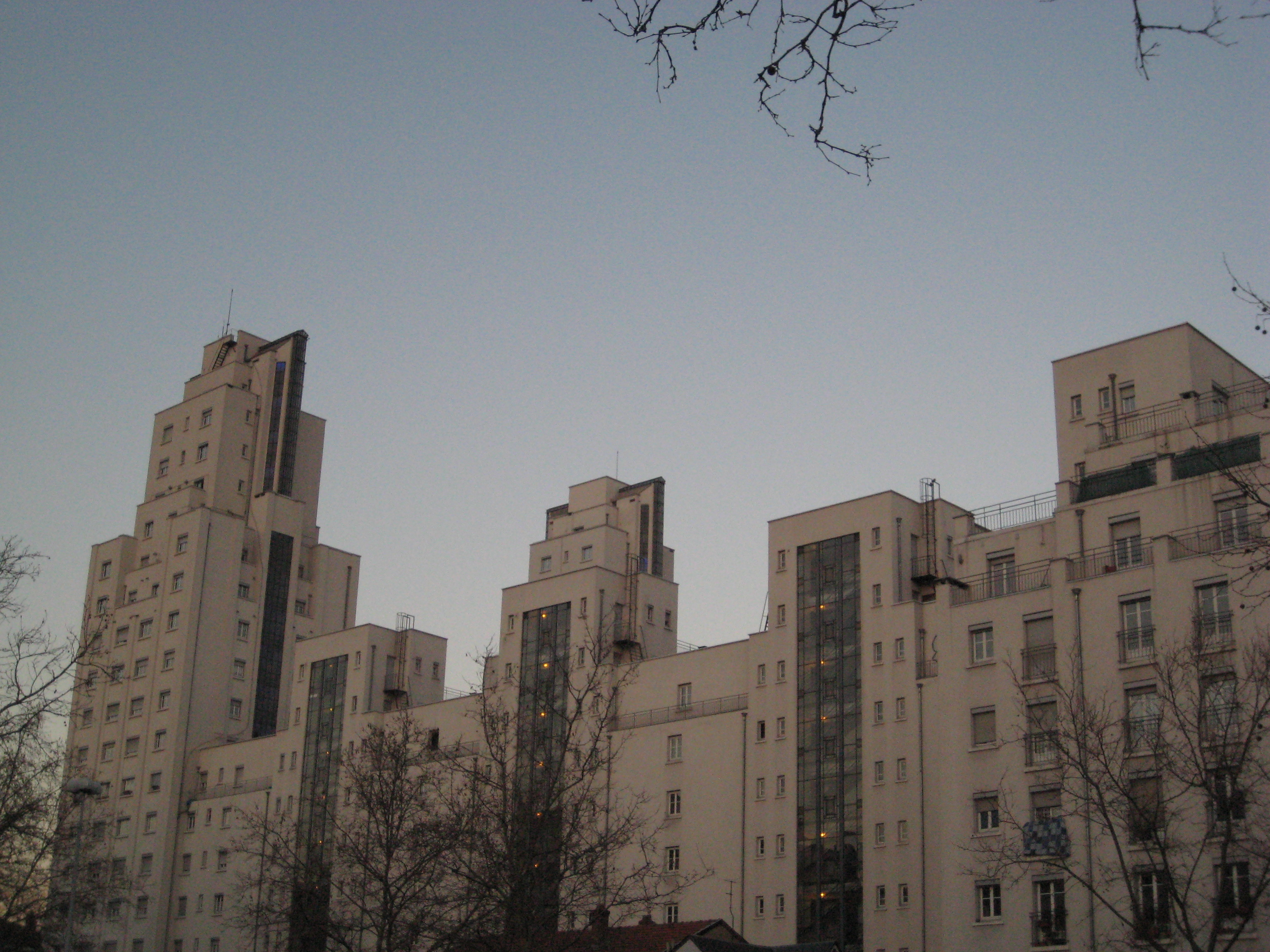 Les Gratte-ciel à Villeurbanne depuis la place Chanoine Boursier